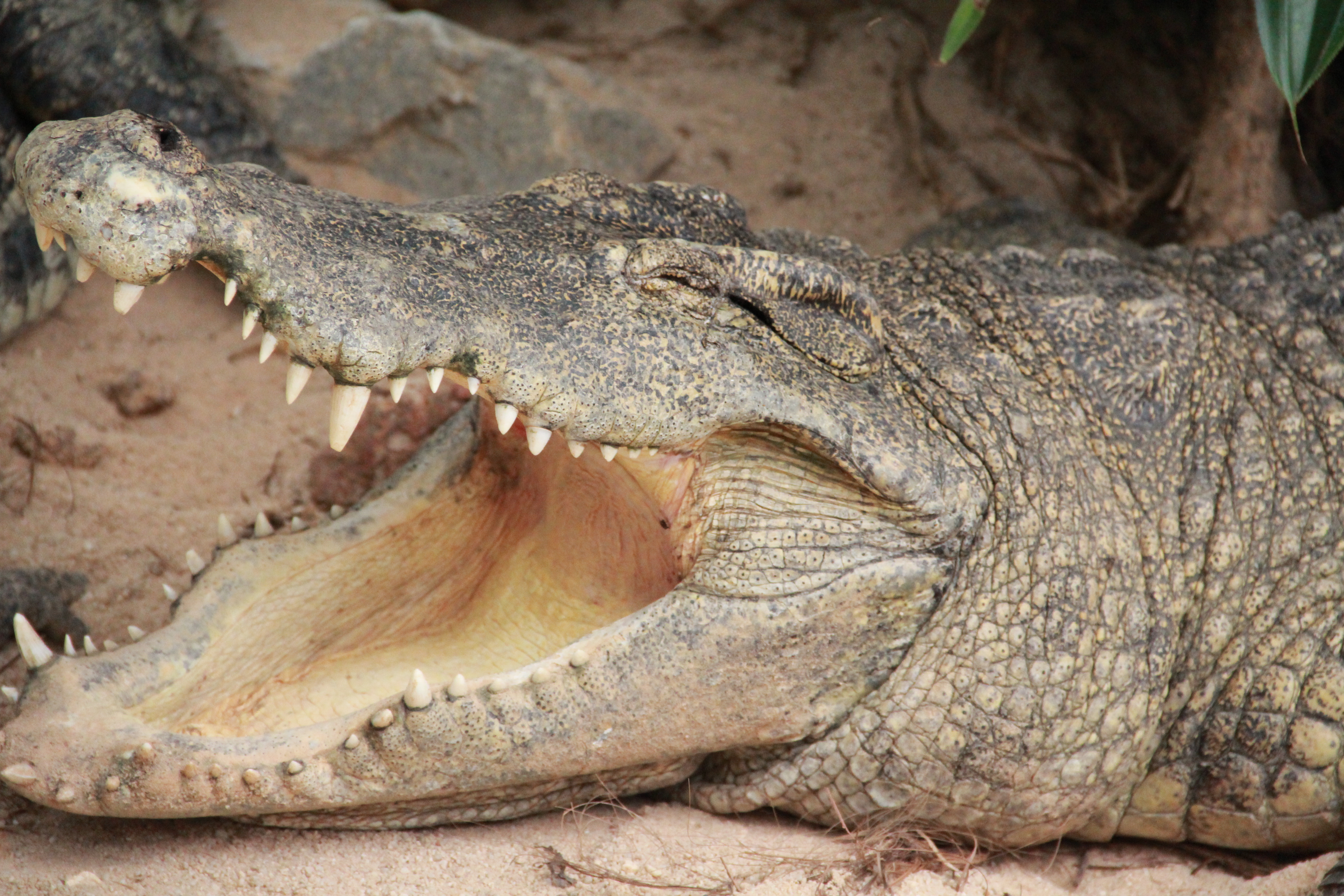 Crocodile ouvrant la gueule et fermant les yeux.